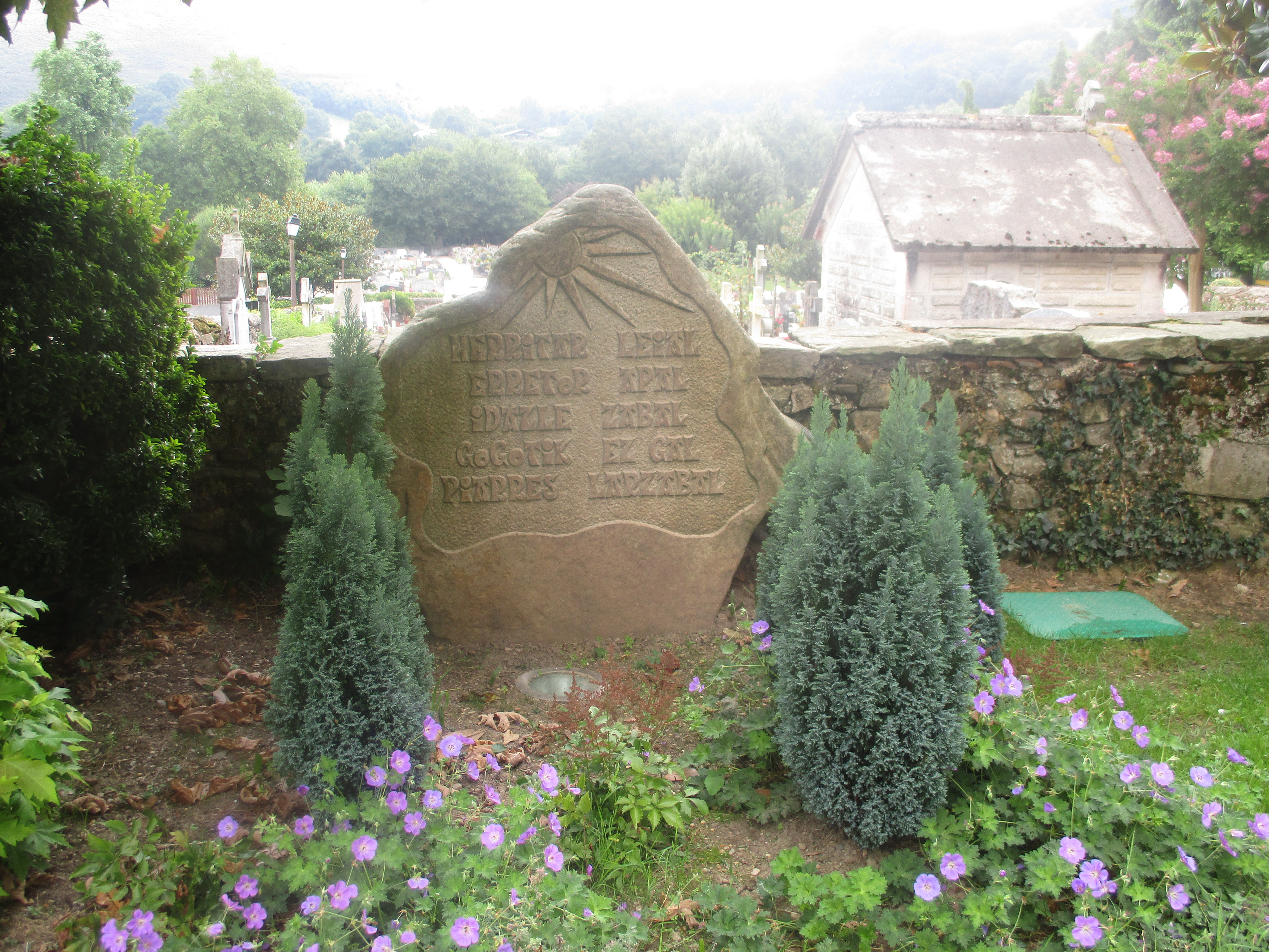 Stèle sur le parvis de l'église d'Ascain en l'honneur du curé écrivain Piarres Larzabal (1915-1988), né à Ascain.